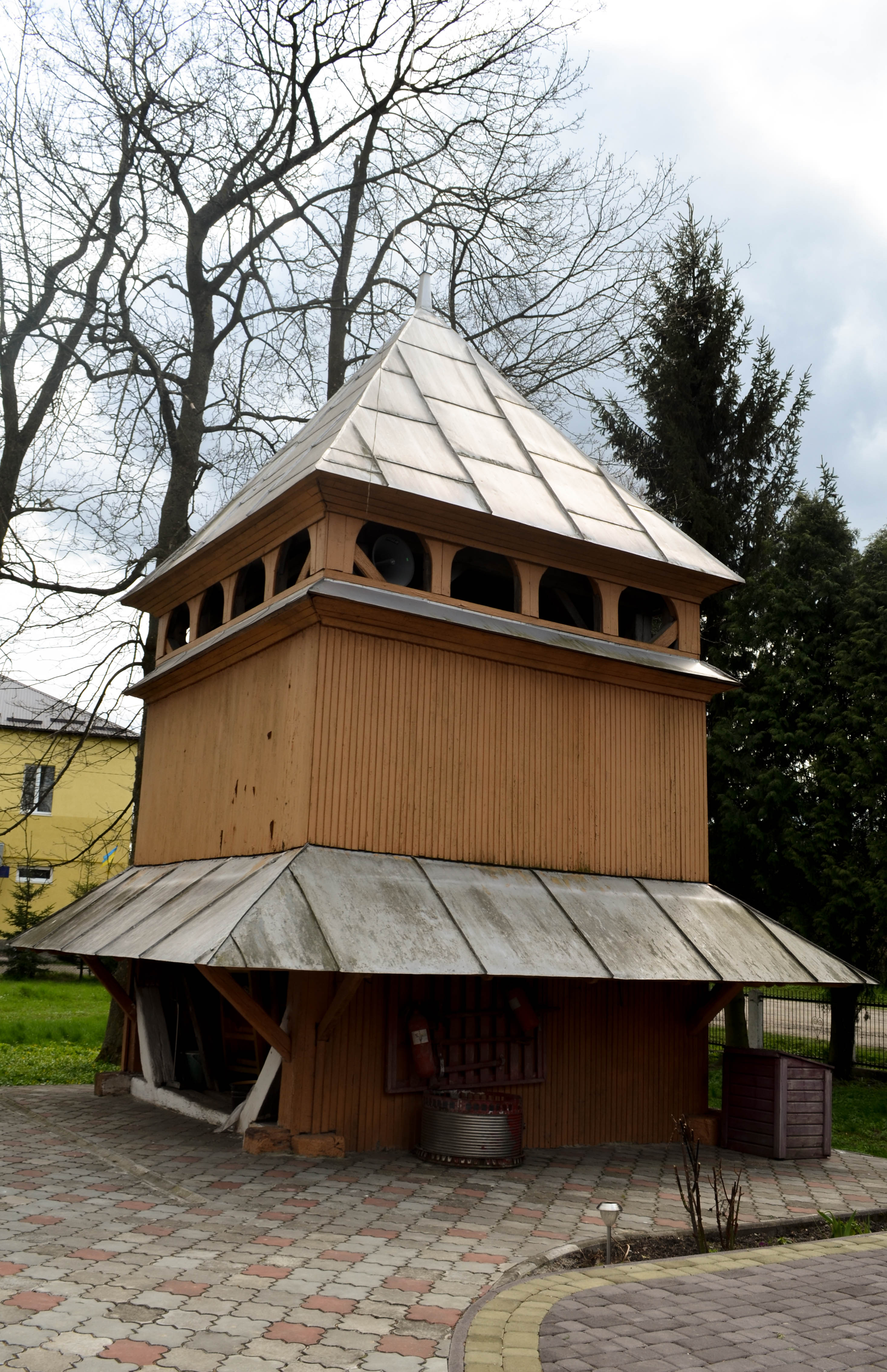 Дзвіниця церкви Святого Василія Великого